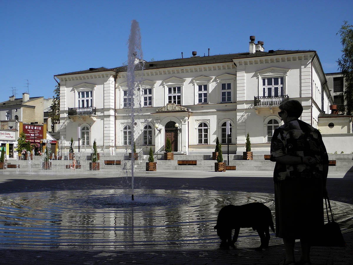 Budynek dawnego Towarzystwa Kredytowego Ziemskiego